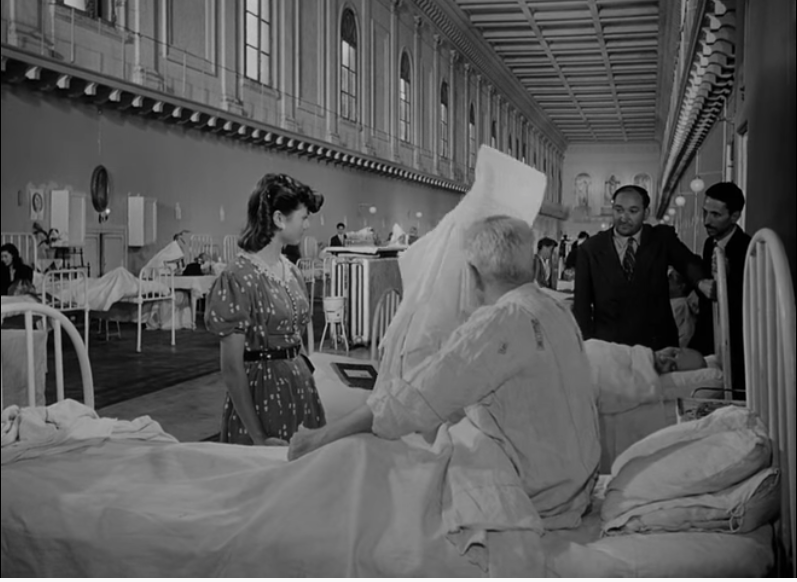 Umberto D - Scena dell'ospedale